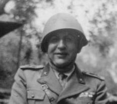 Angelo Luigi Fiorita. Foto di famiglia dell'utente.